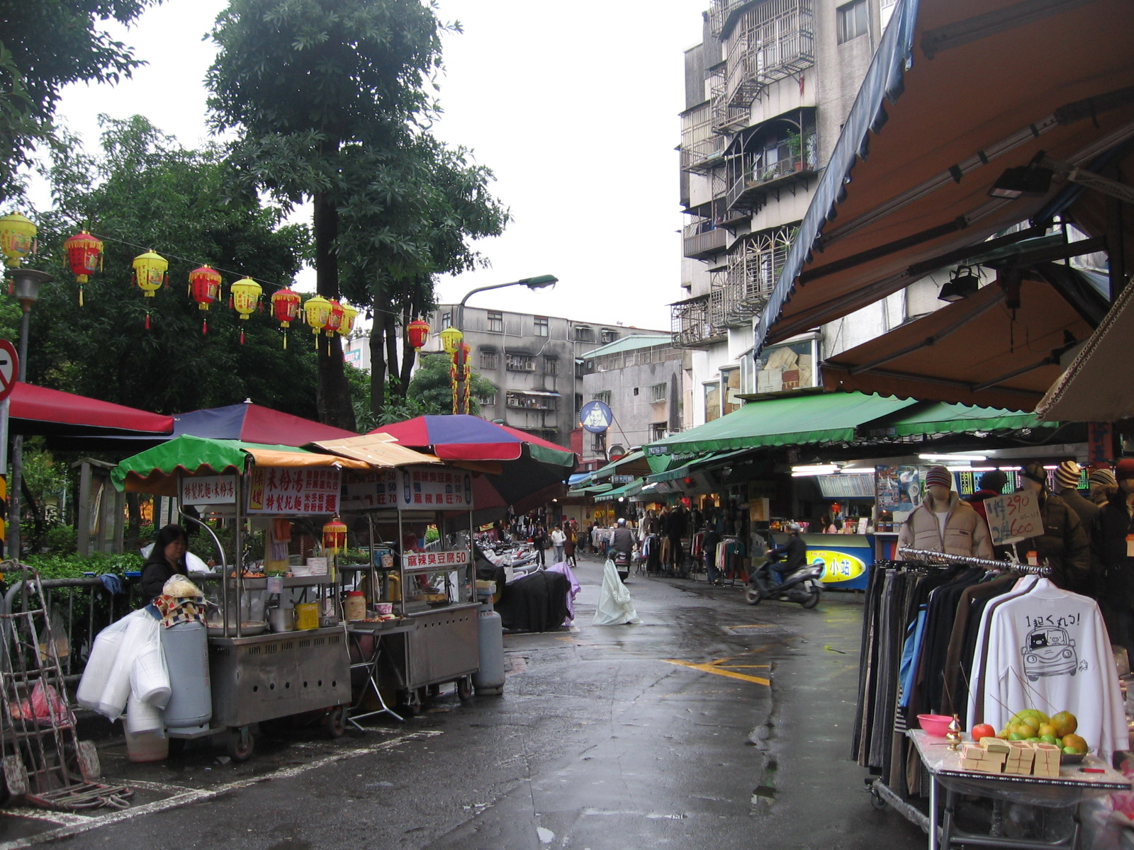 Wufenpu, Taipei, Taiwan